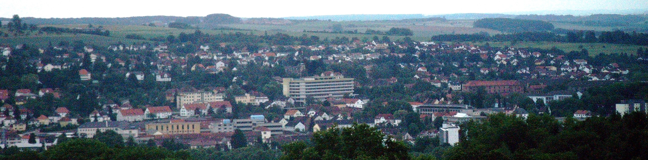 Zweibrücker Fotograf: Benutzer:Heg